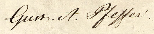 Gustaf Albrecht Pfeffers namnteckning på en bygglovsritning